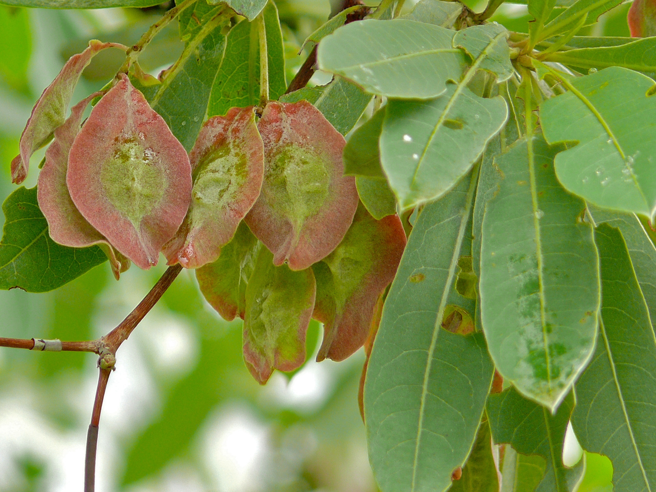 Mahonie Loop, Punda Maria, Kruger NP, SOUTH AFRICA